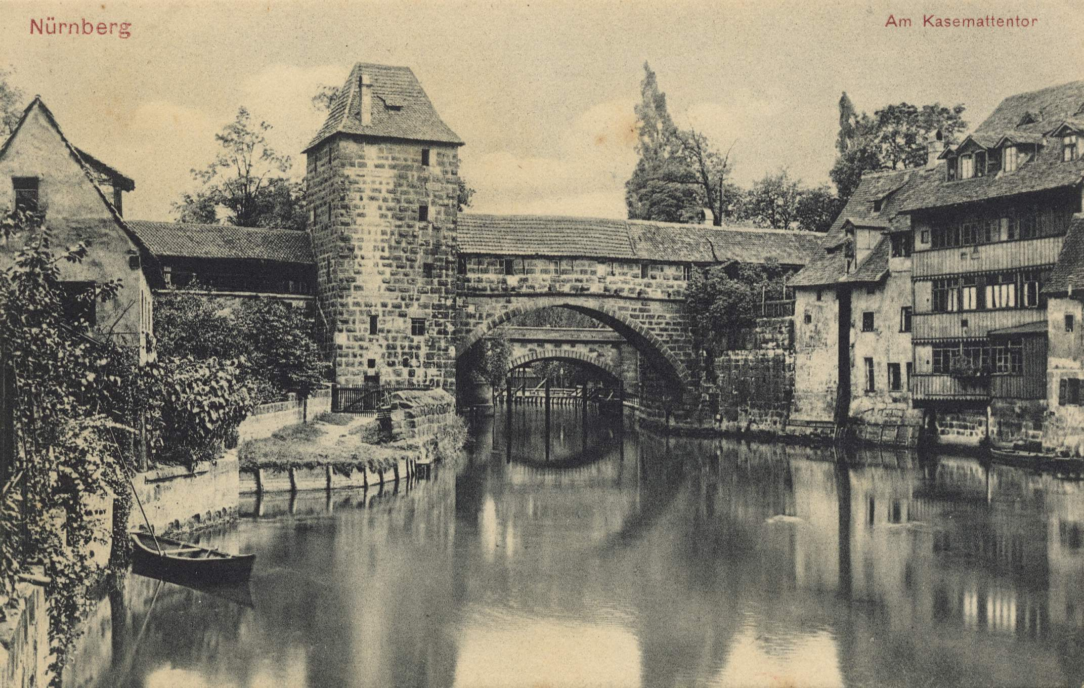 Kasemattentor der Nürnberger Stadtmauer und Turm Blaues B